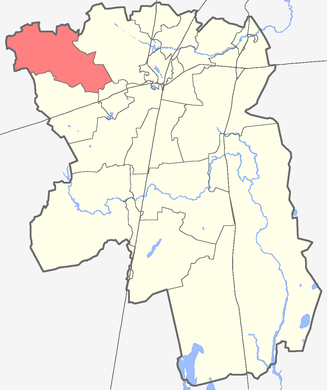 Сяськелевское сельское поселение на карте Гатчинского района